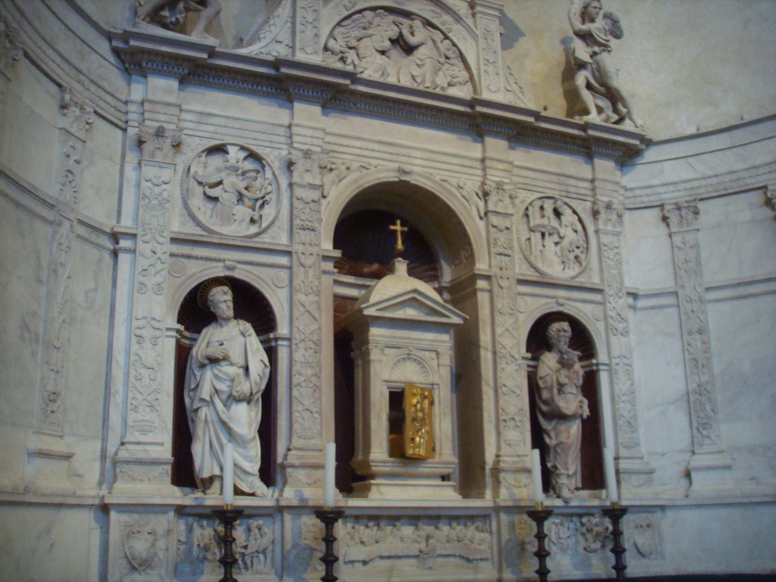 Santo Spirito, andrea sansovino, altare del sacramento, 1490 circa